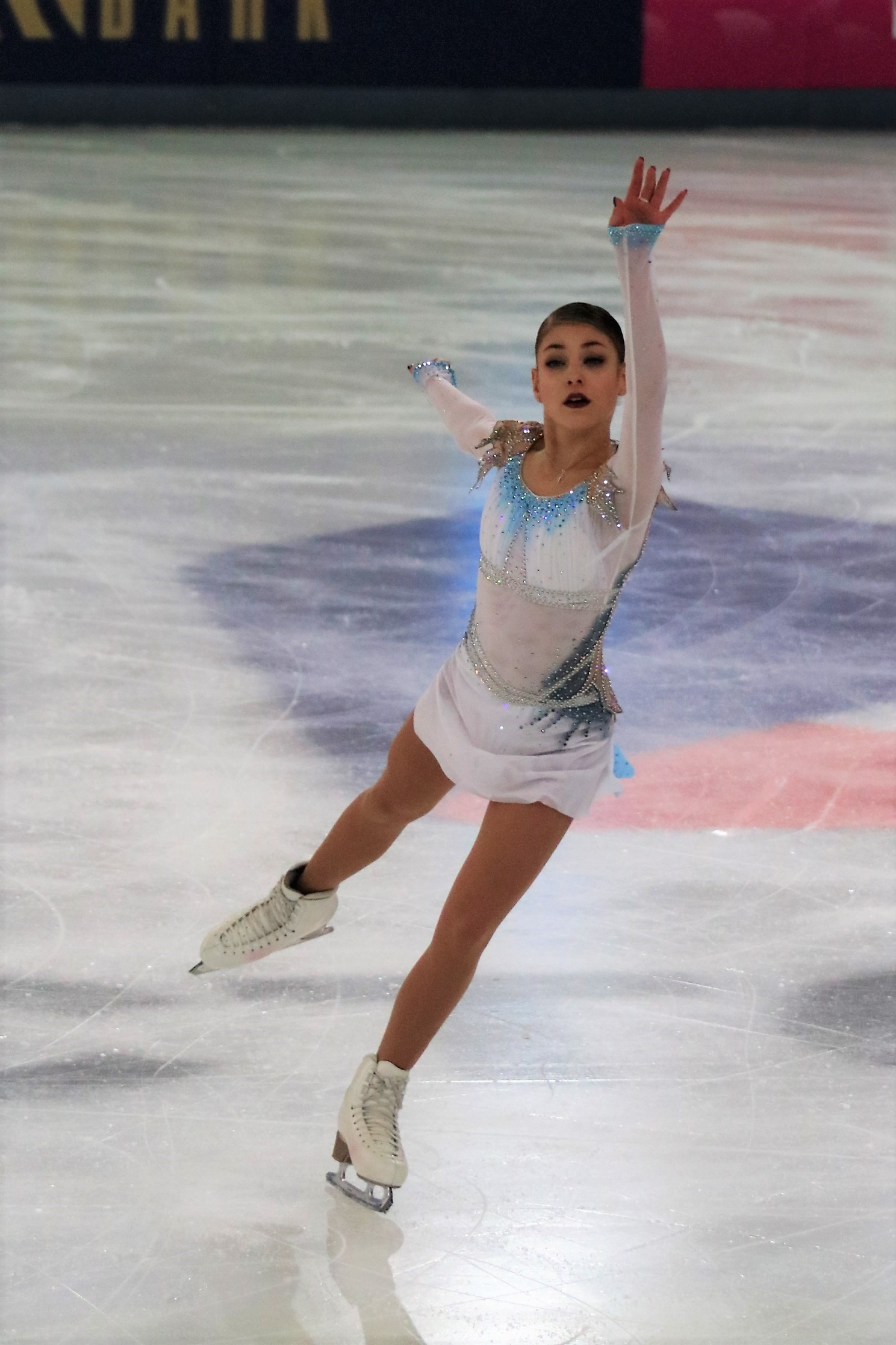 Алена Косторная на чемпионате России по фигурному катанию на коньках 2019